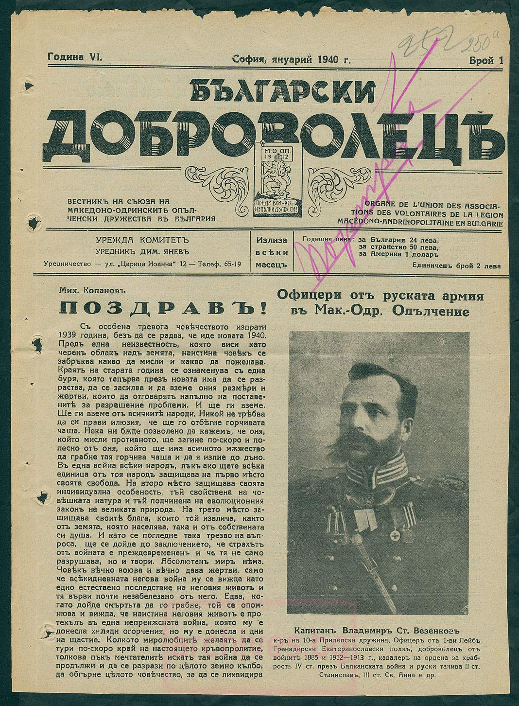 Брой на Български доброволец.